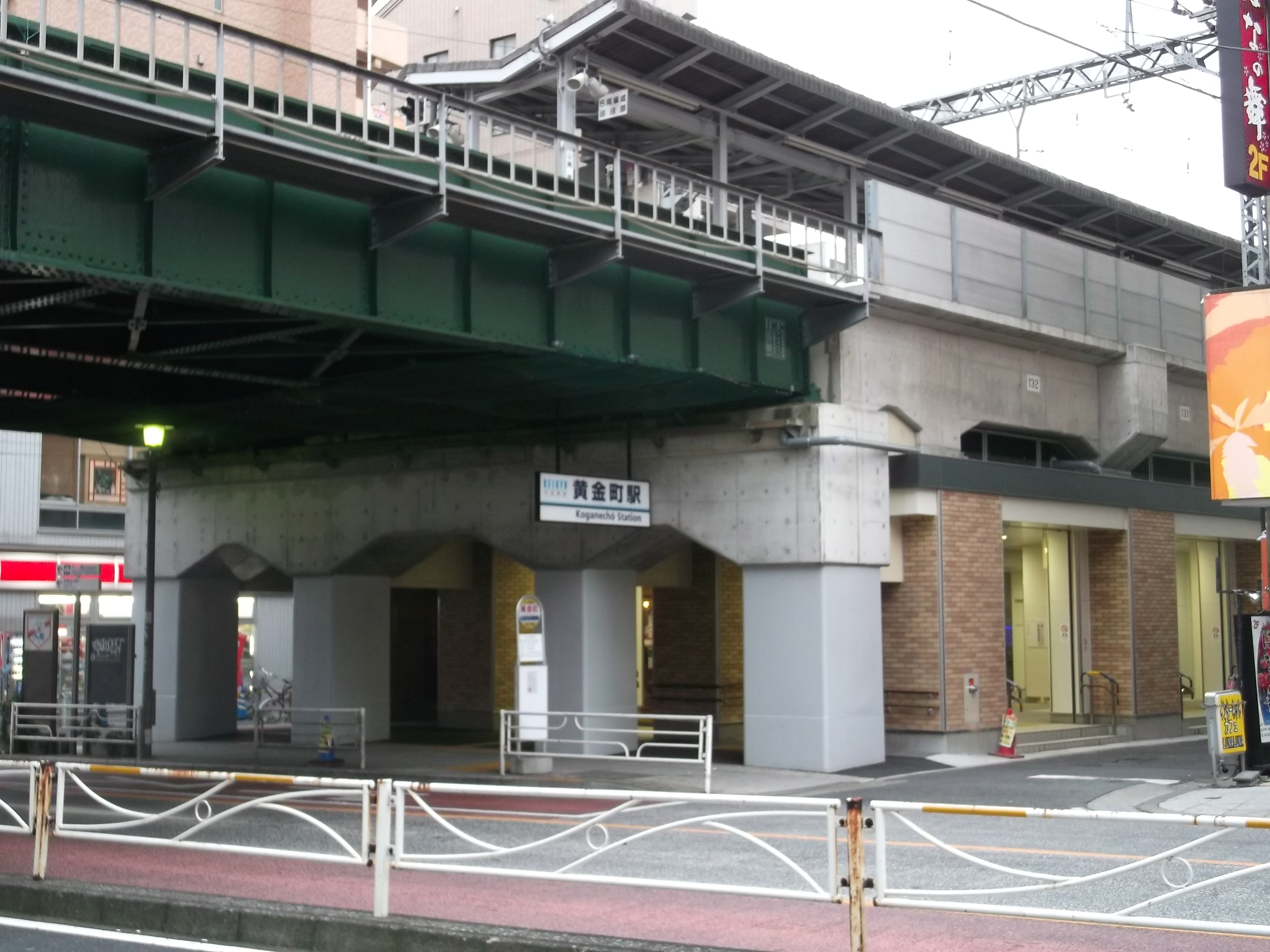 京浜急行本線 黄金町駅入口